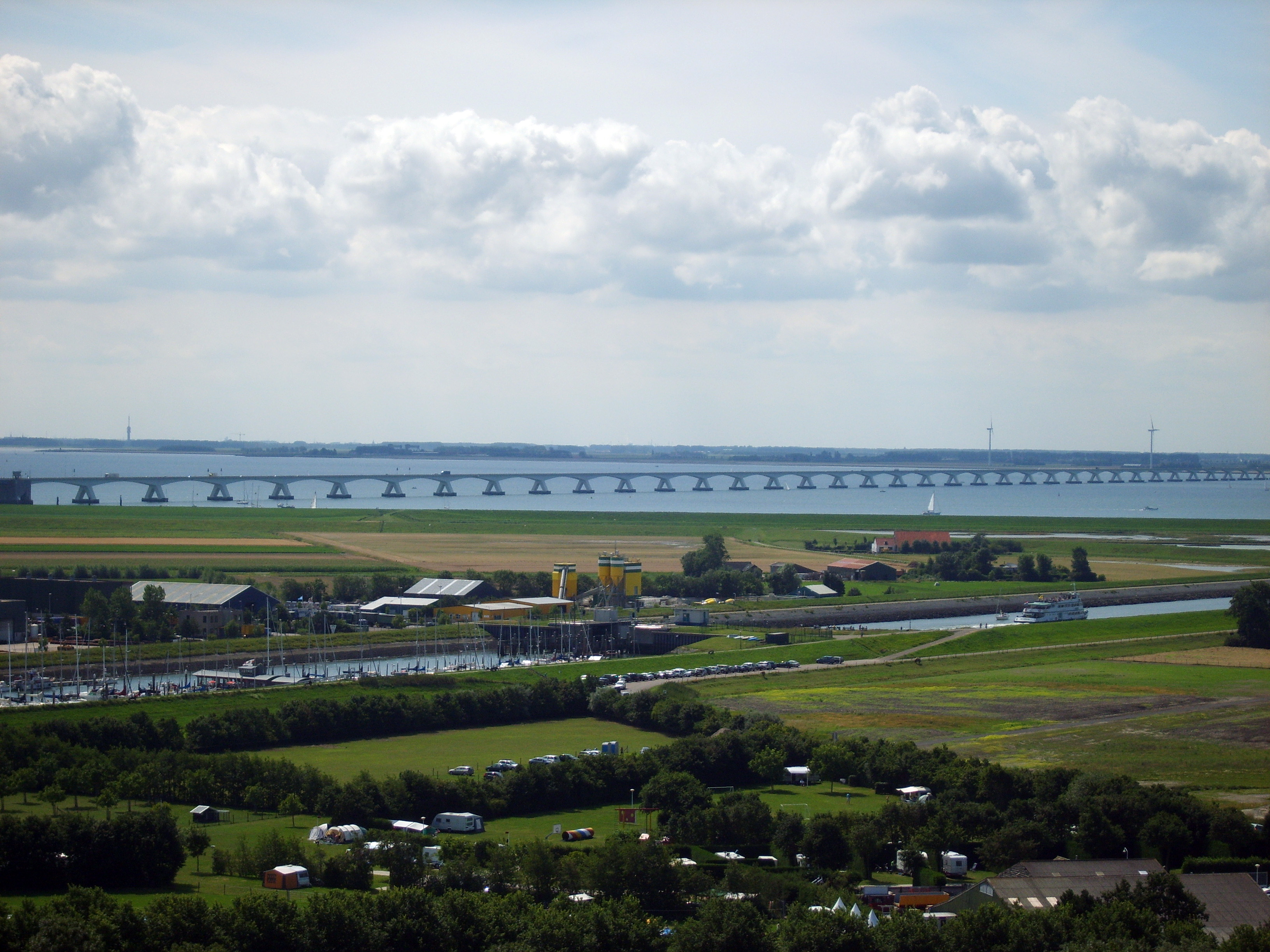 Zierikzee